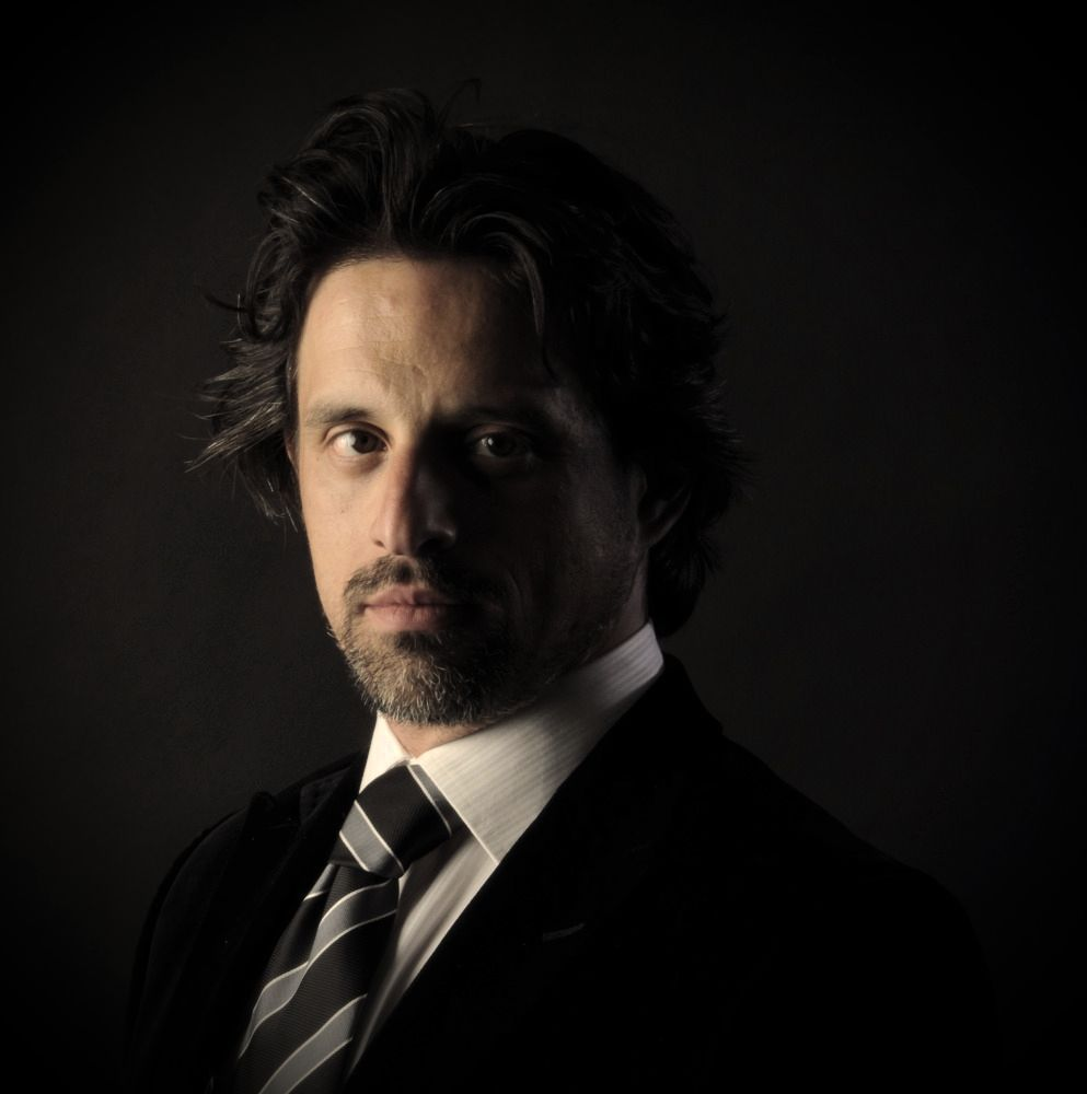 Ludovik Kendi 2016